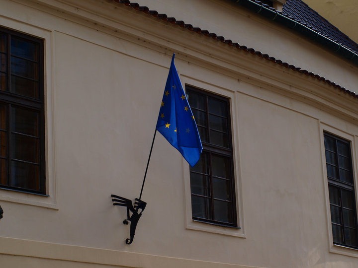 Vlajka EU na Hrzánském paláci v Praze